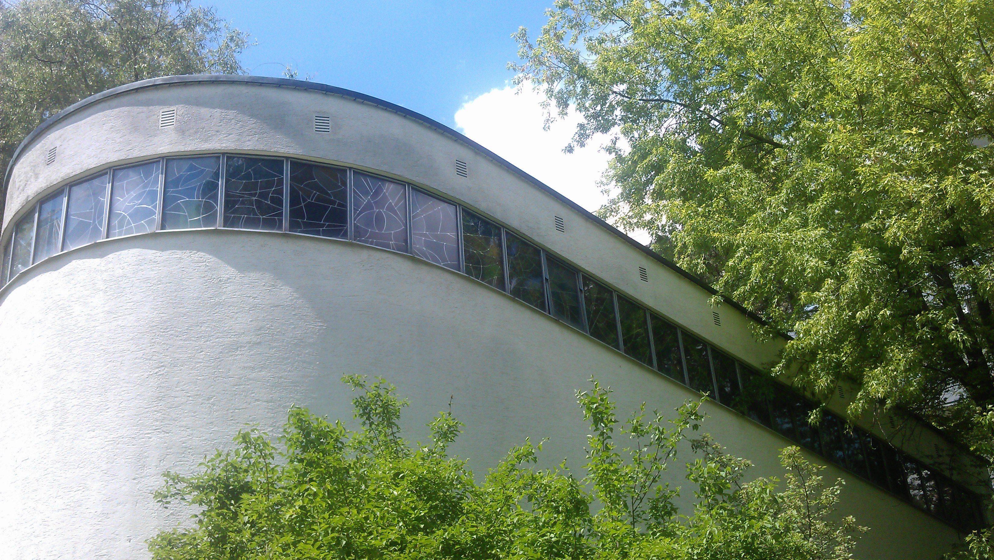 von Julius Konzel, Architekt